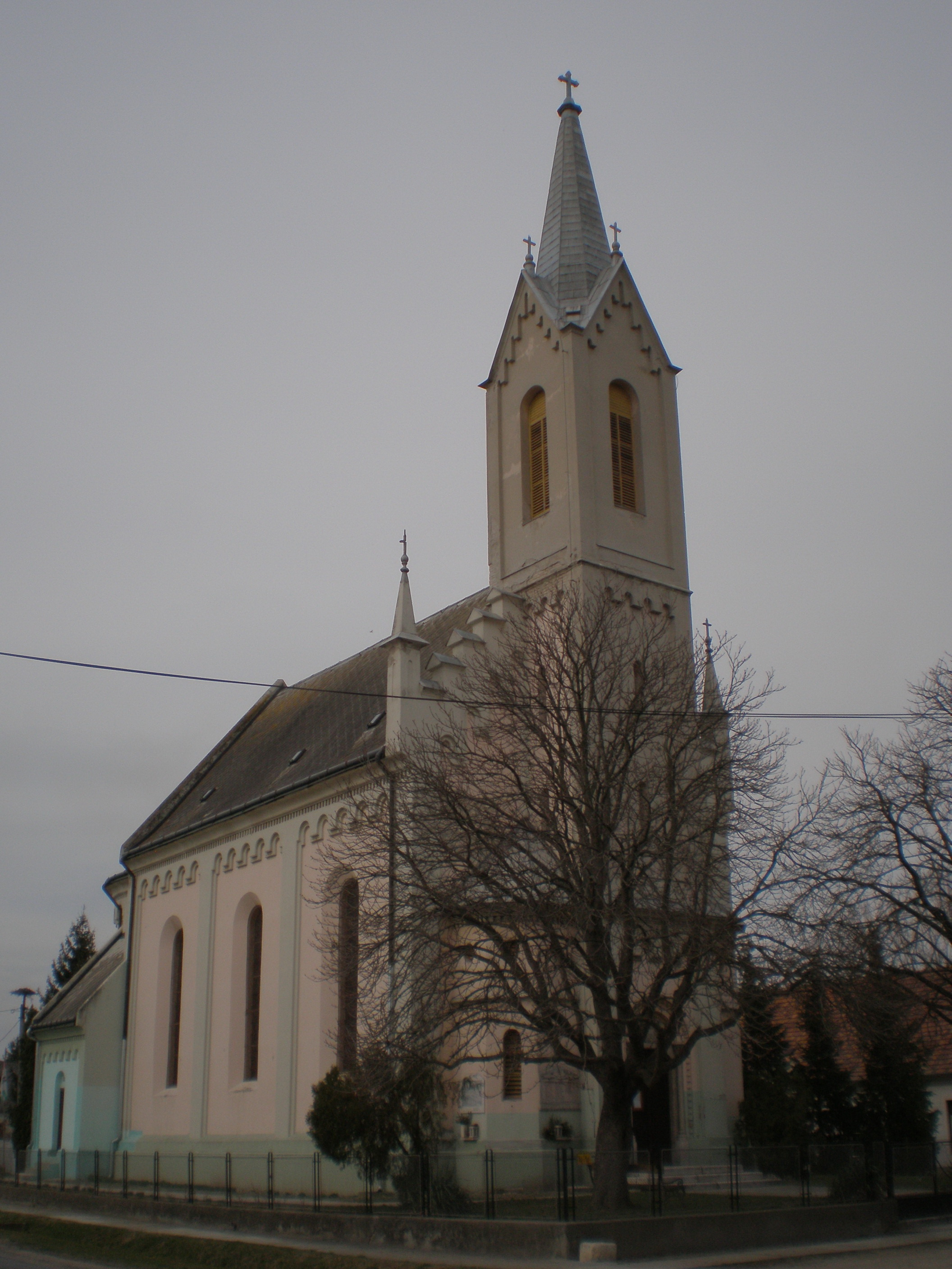 Római katolikus templom (Mecsér, Győr-Moson-Sopron megye, Magyarország)